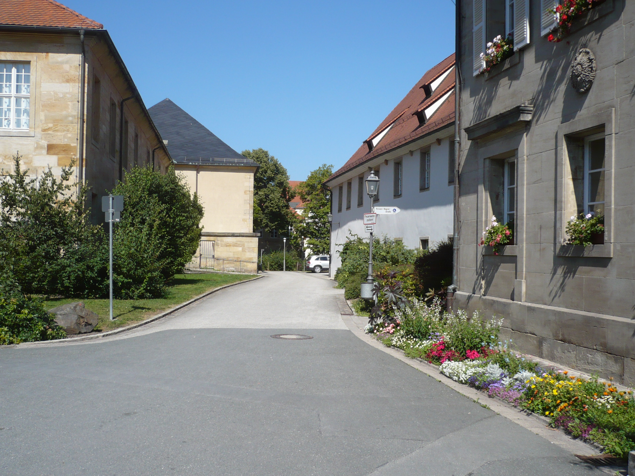 Glasenappweg Bayreuth